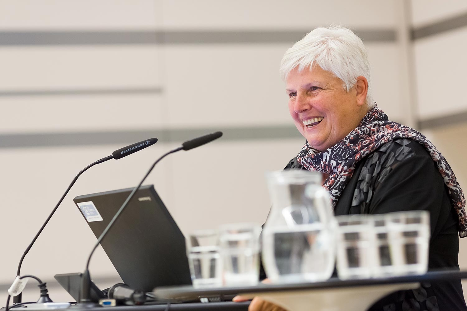 Heidemarie anlässlich der ersten Graduierung von StudentInnen des Bachelorstudiums Sozialmanagement in der Elementarpädagogik an der Fachhochschule Campus Wien